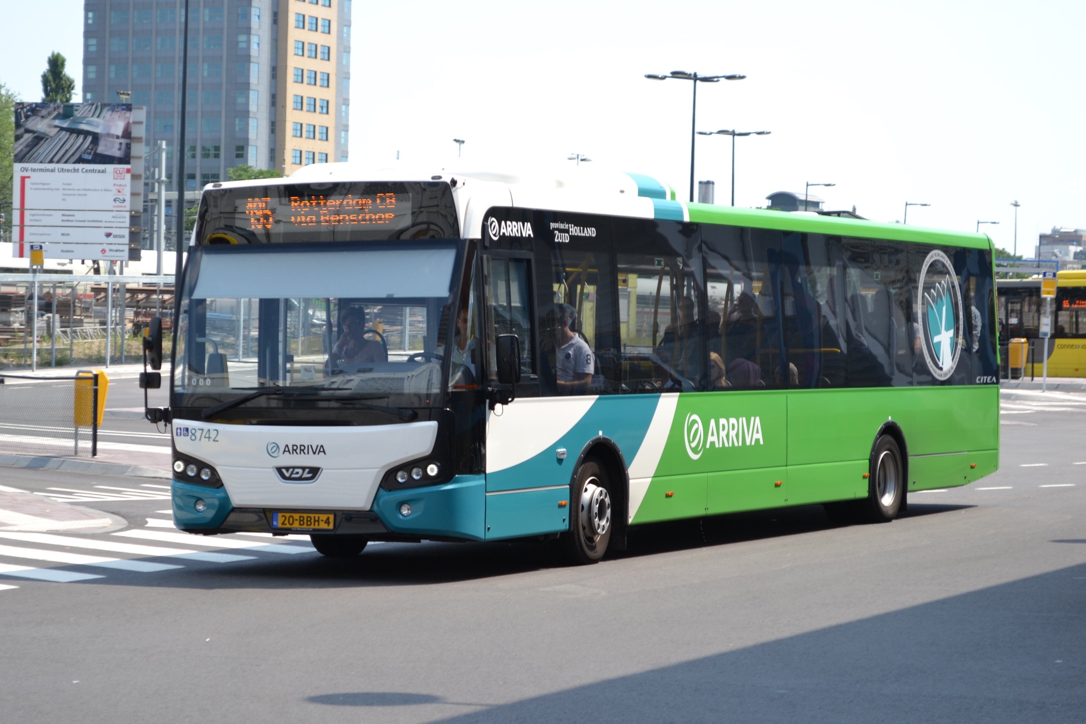 Arriva 8742, een Citea, als lijn 195 (Arriva/Connexxion) naar Rotterdam bij het Utrechtse busstation West.